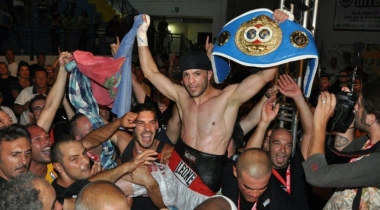 Floriano Pagliara portato in trionfo dopo la conquista della cintura di campione mediterraneo Ibf